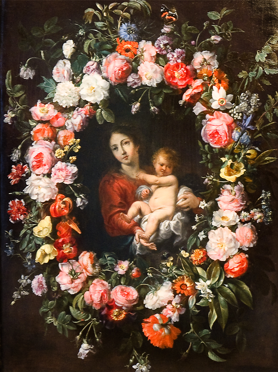 Maria met Kind in een bloemenkranslabel QS:Lnl,"Maria met Kind in een bloemenkrans"